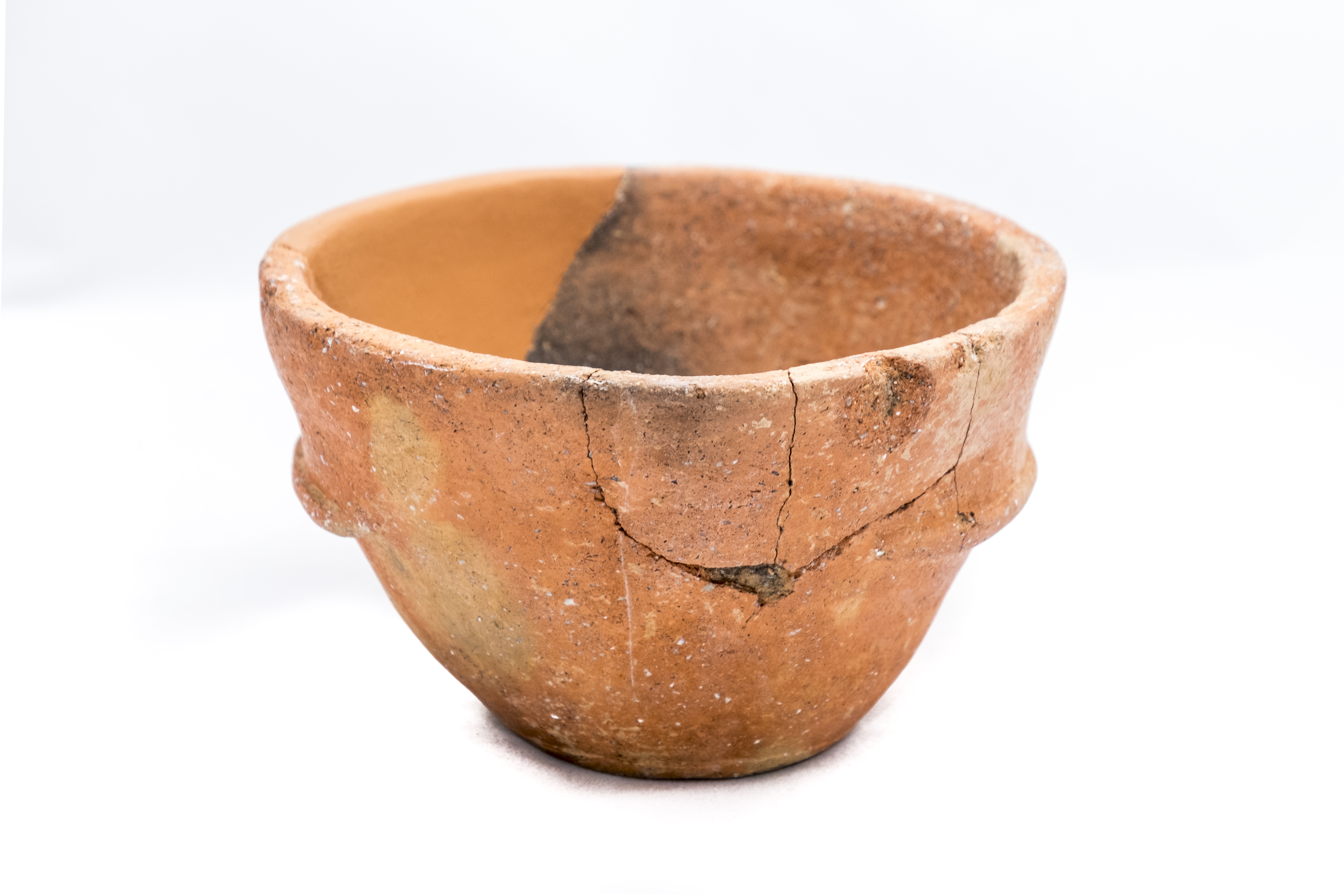 Vaset troncocònic de la cultura talaiòtica amb petits elements de prensió